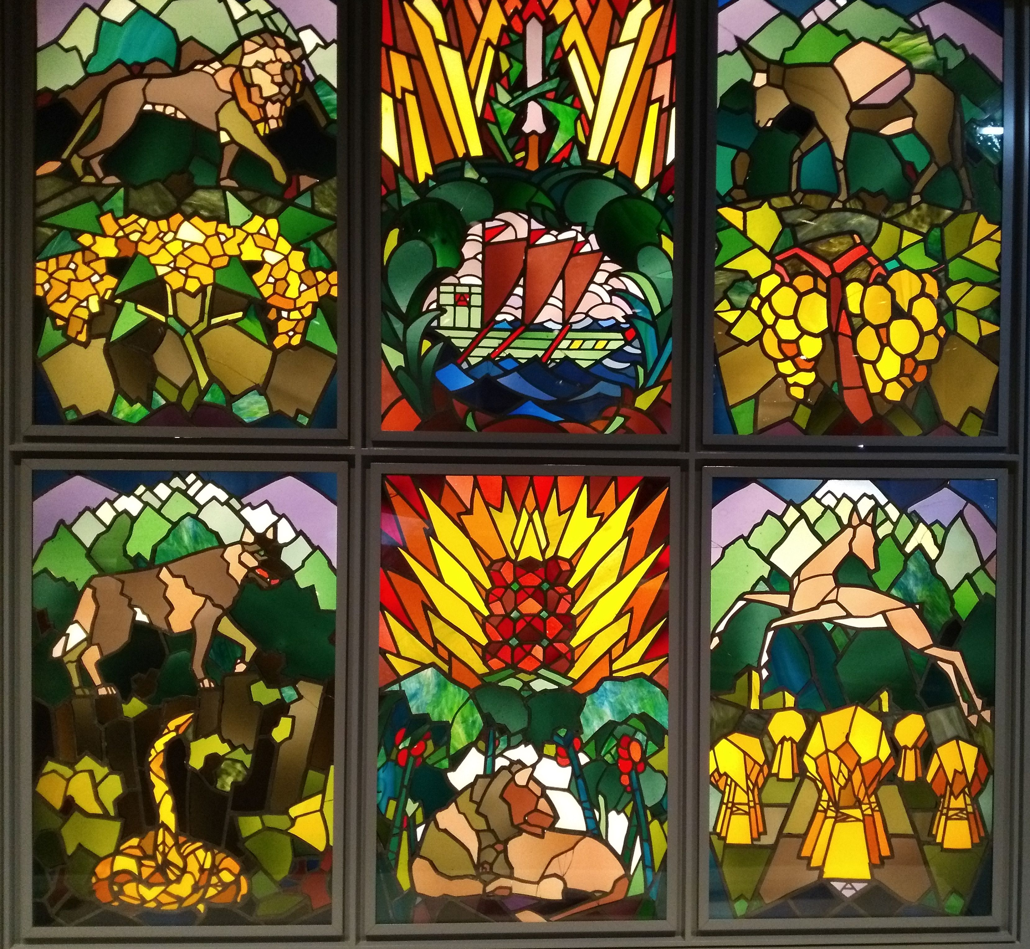 Die Fenster der ehemaligen Synagoge auf dem Markenhof bei Kirchzarten. Der Entwurf von Friedrich Adler, entstanden 1919/1920, zeigt die "12 Stämme Israels". Die Originale befinden sich im Tel Aviv Museum od Art, Kopien im Museum zur Geschichte von Christen und Juden in Laupheim.